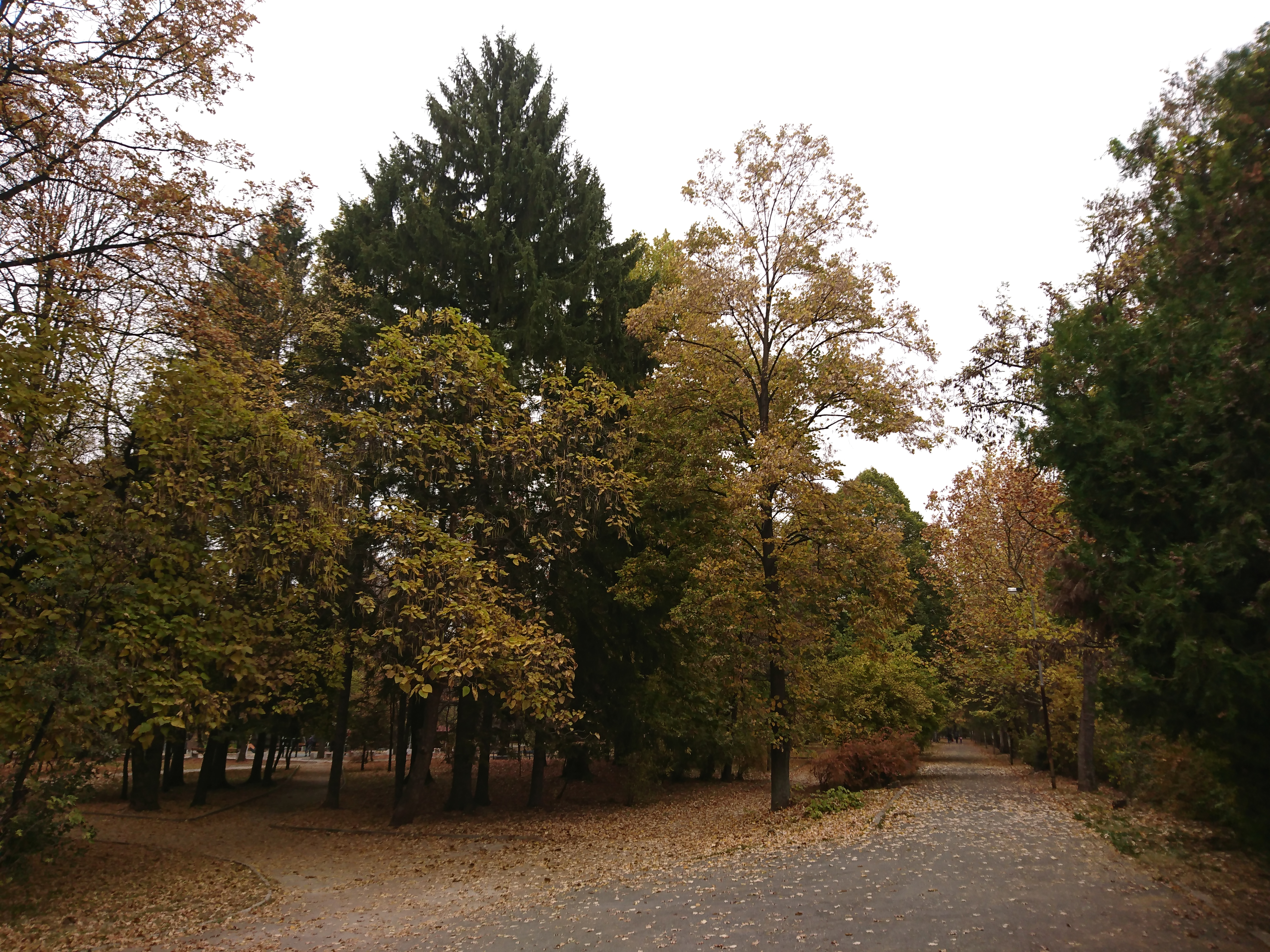 Градският парк на Перник през есента.